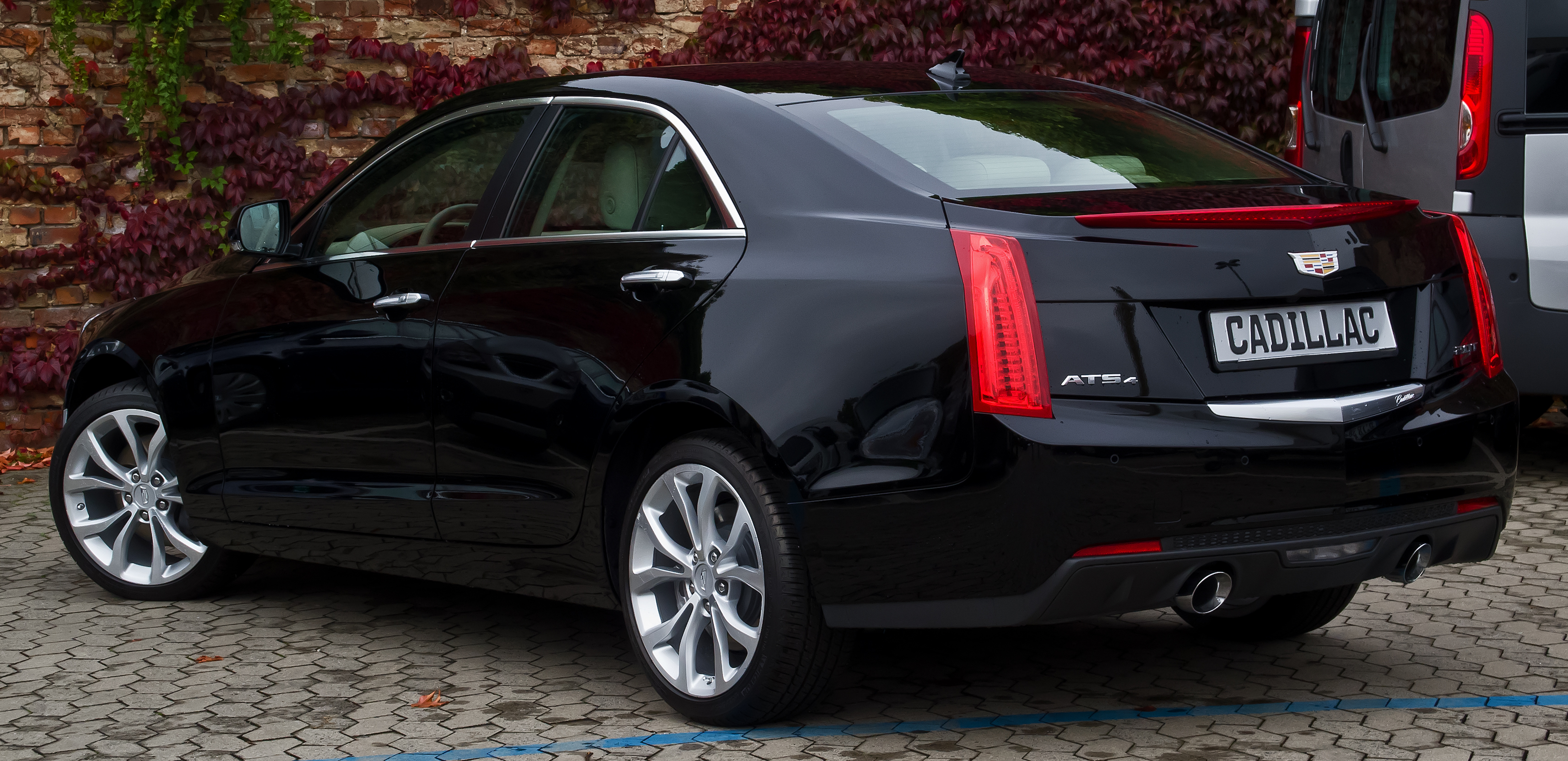 Cadillac ATS 2.0 Turbo AWD Premium